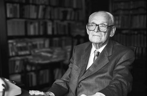 Theodor Maunz im Arbeitszimmer seines Wohnhauses in Gräfelfing (Bayern). Veröffentlicht in: Münchner Merkur Nr. 200, Freitag, 30. August 1991, Seite W1